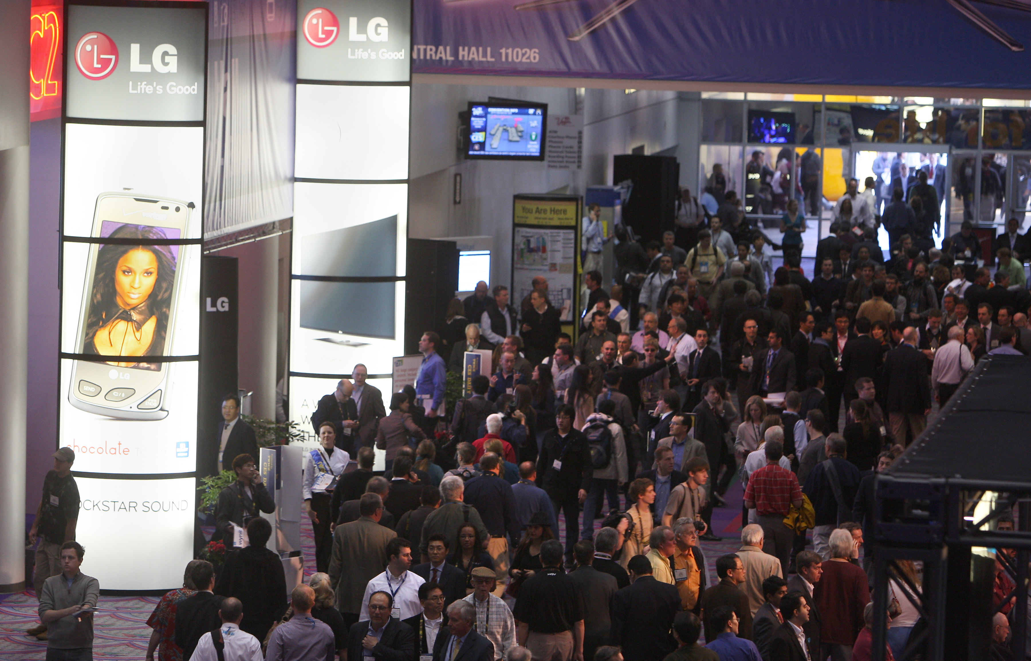 LG전자 CES, 행사장 전경